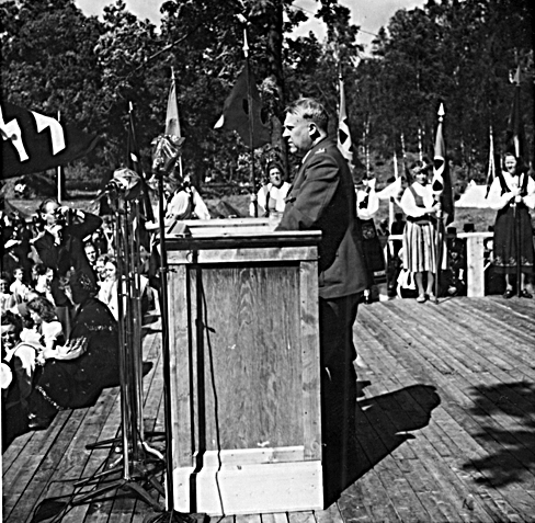 RA/PA-0750/Gk/0001 1117